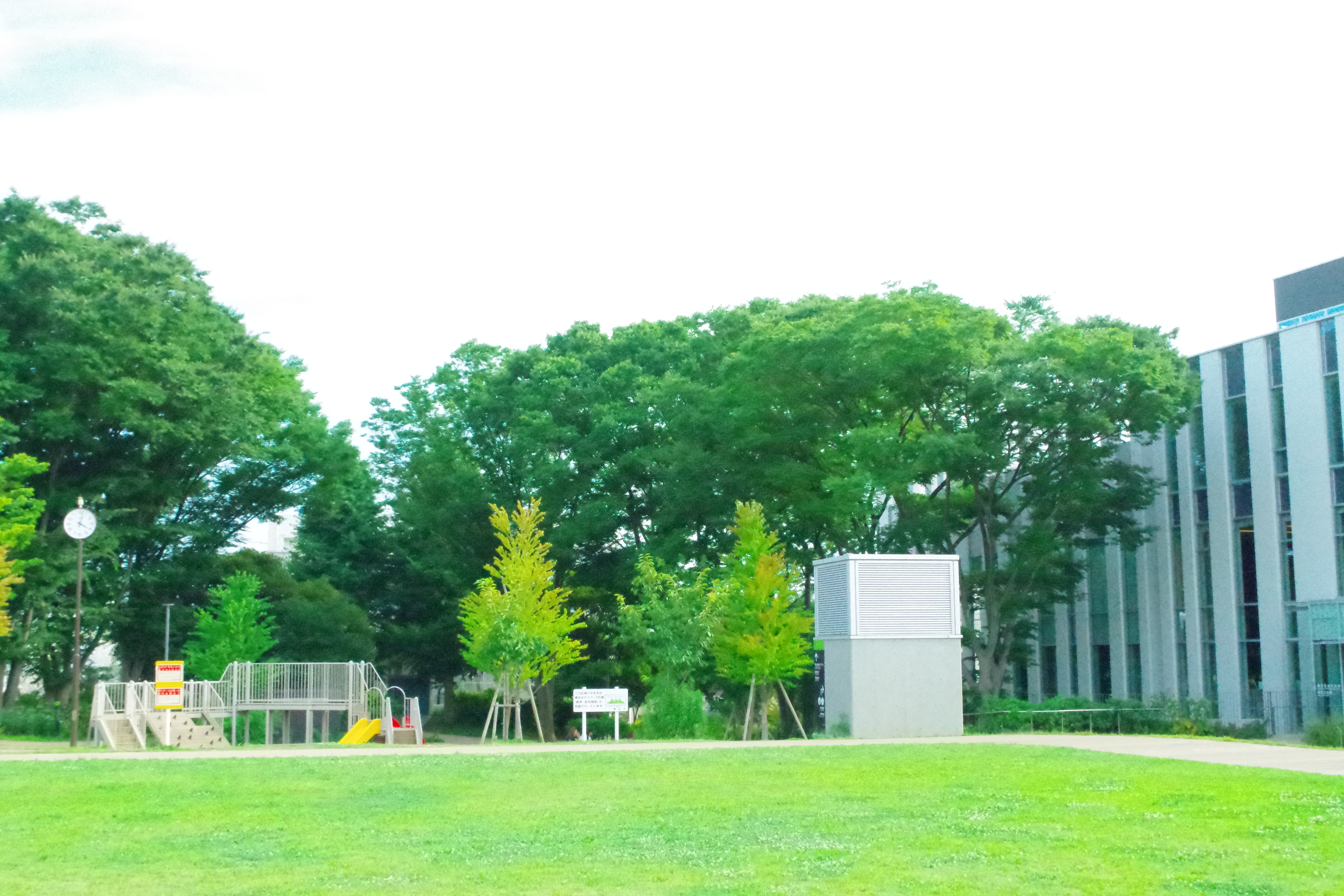 庁舎に隣接した二ツ橋公園からの撮影